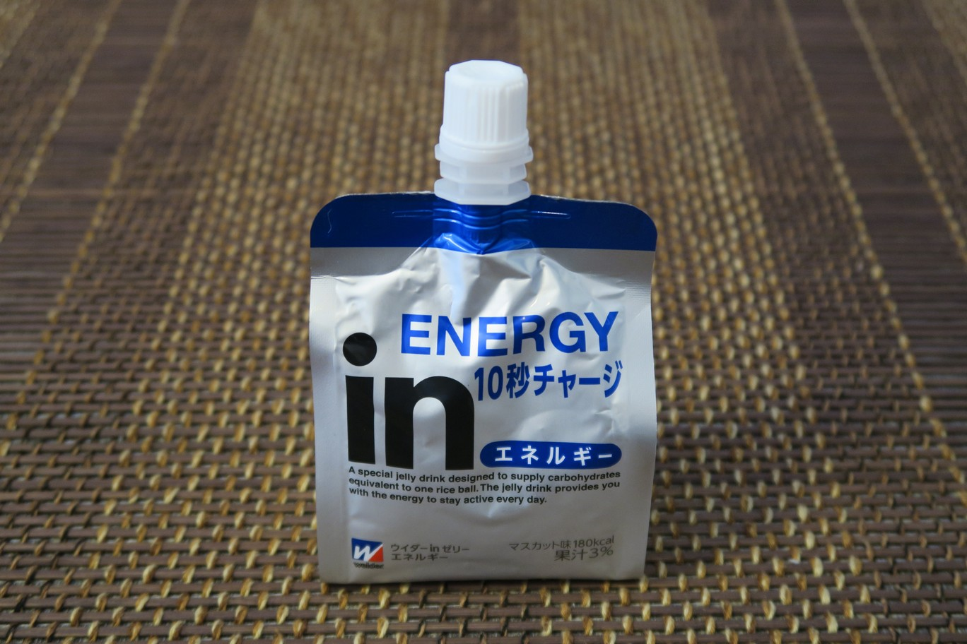 ウィダーinゼリー エネルギーイン